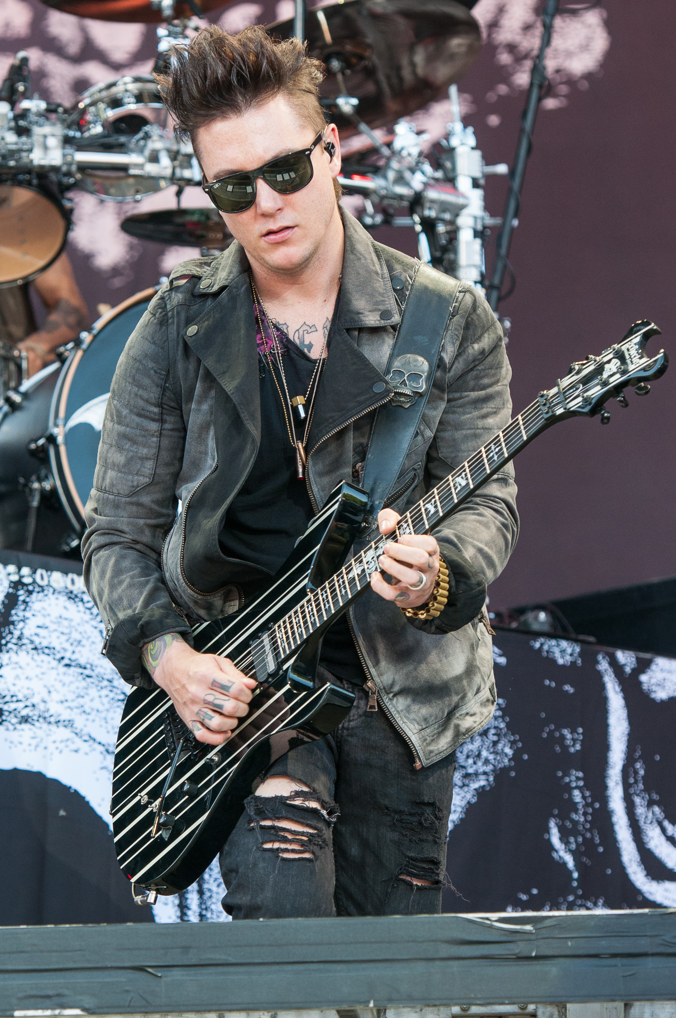 ARGO-Konzerte,Avenged Sevenfold,Brian Elwin Haner Jr.,Konzert,Livekonzert,Livemusik,Musik,RiP,Rock im Park 2014,Synyster Gates